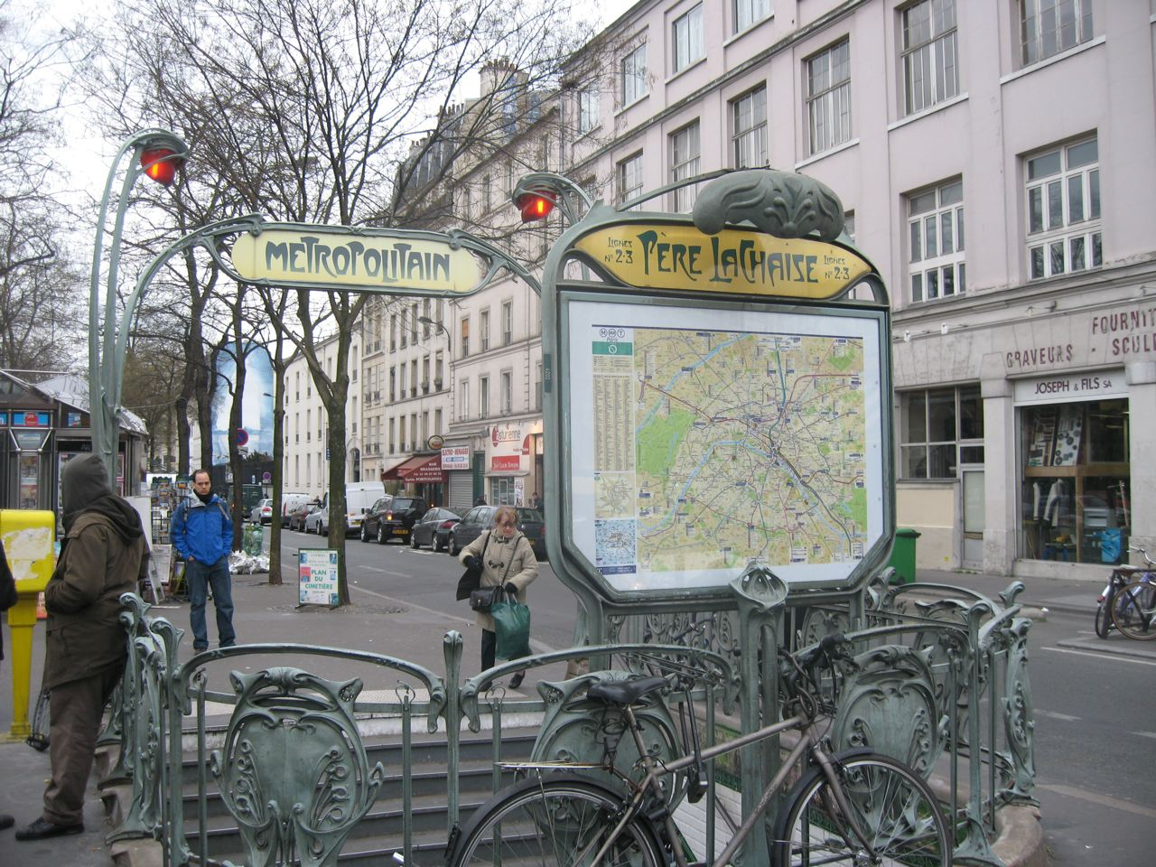 Père Lachaise metro entrance